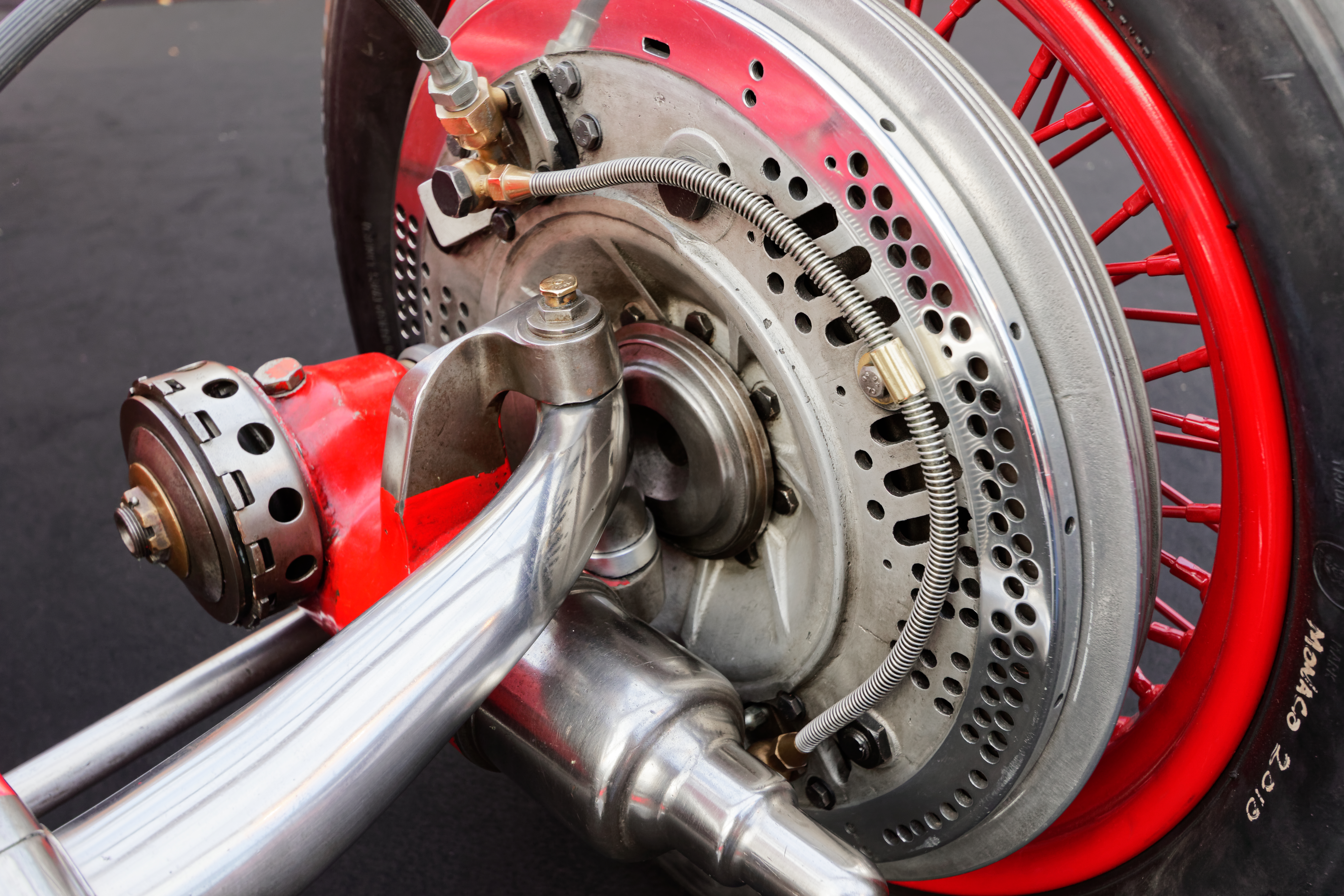 Une Alfa Romeo Tipo B P3 de 1934 exposée lors de la vente RM Sotheby’s 2017 aux Invalides à Paris.